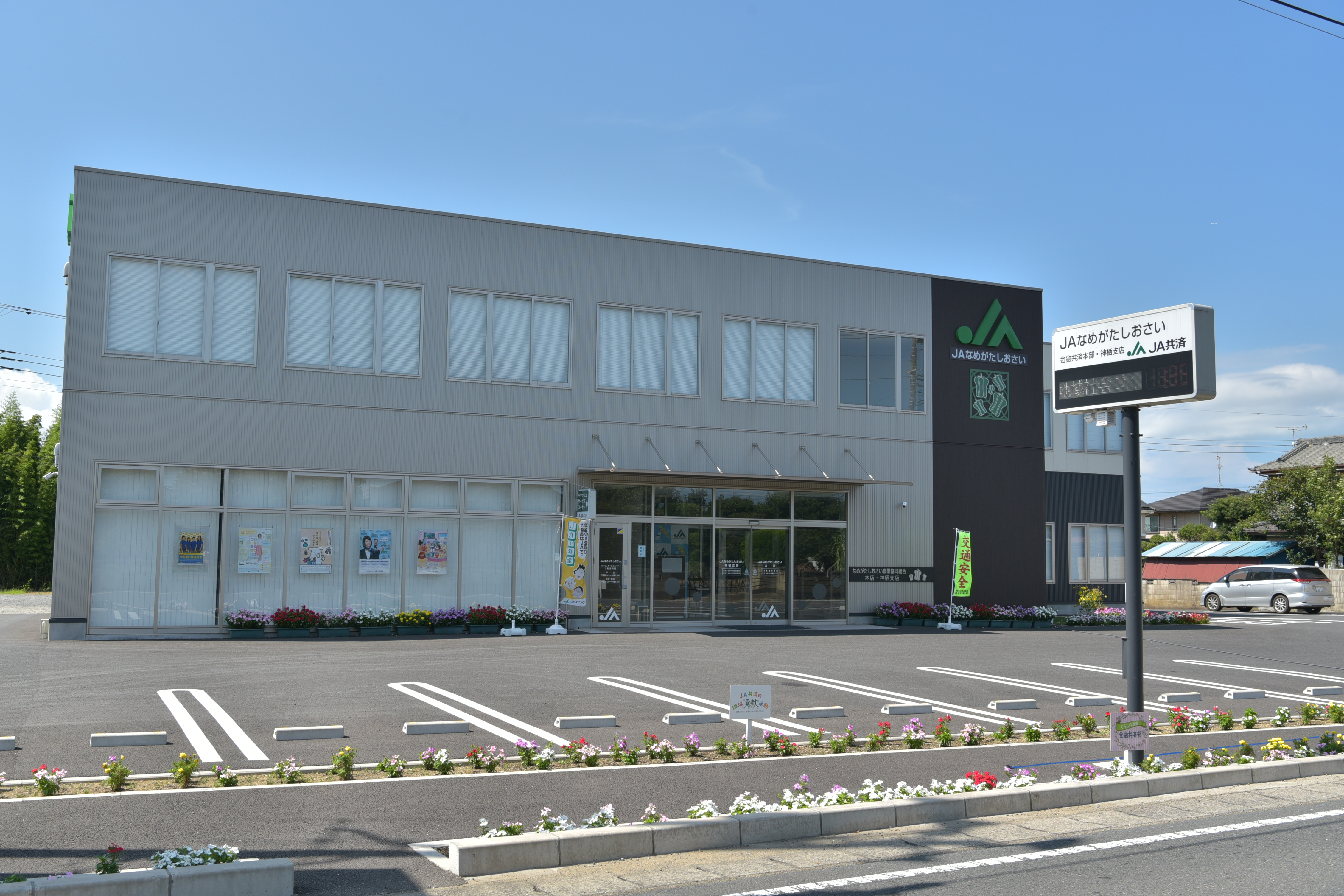 なめがたしおさい農業協同組合 金融共済本部（神栖市）の建物